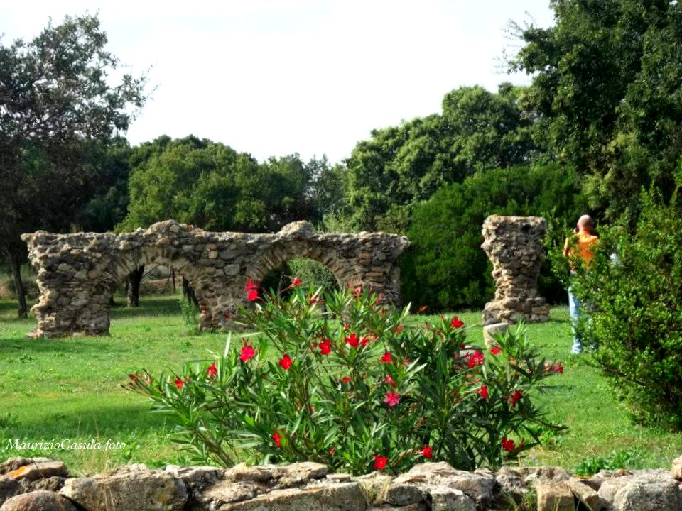 Acquedotto romano This is a photo of a monument which is part of cultural heritage of Italy.